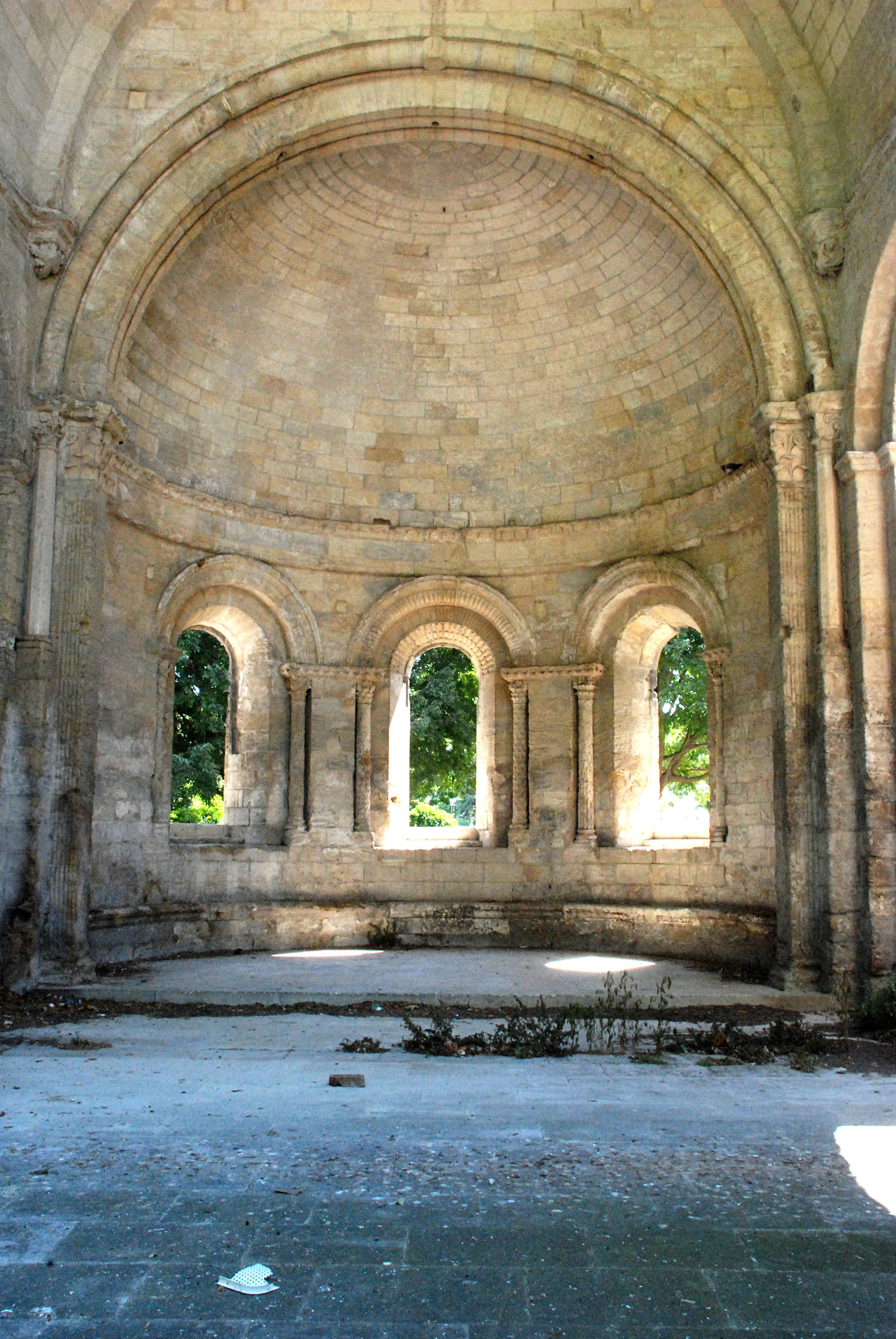 France - Provence - Abbaye de Saint-Ruf d'Avignon